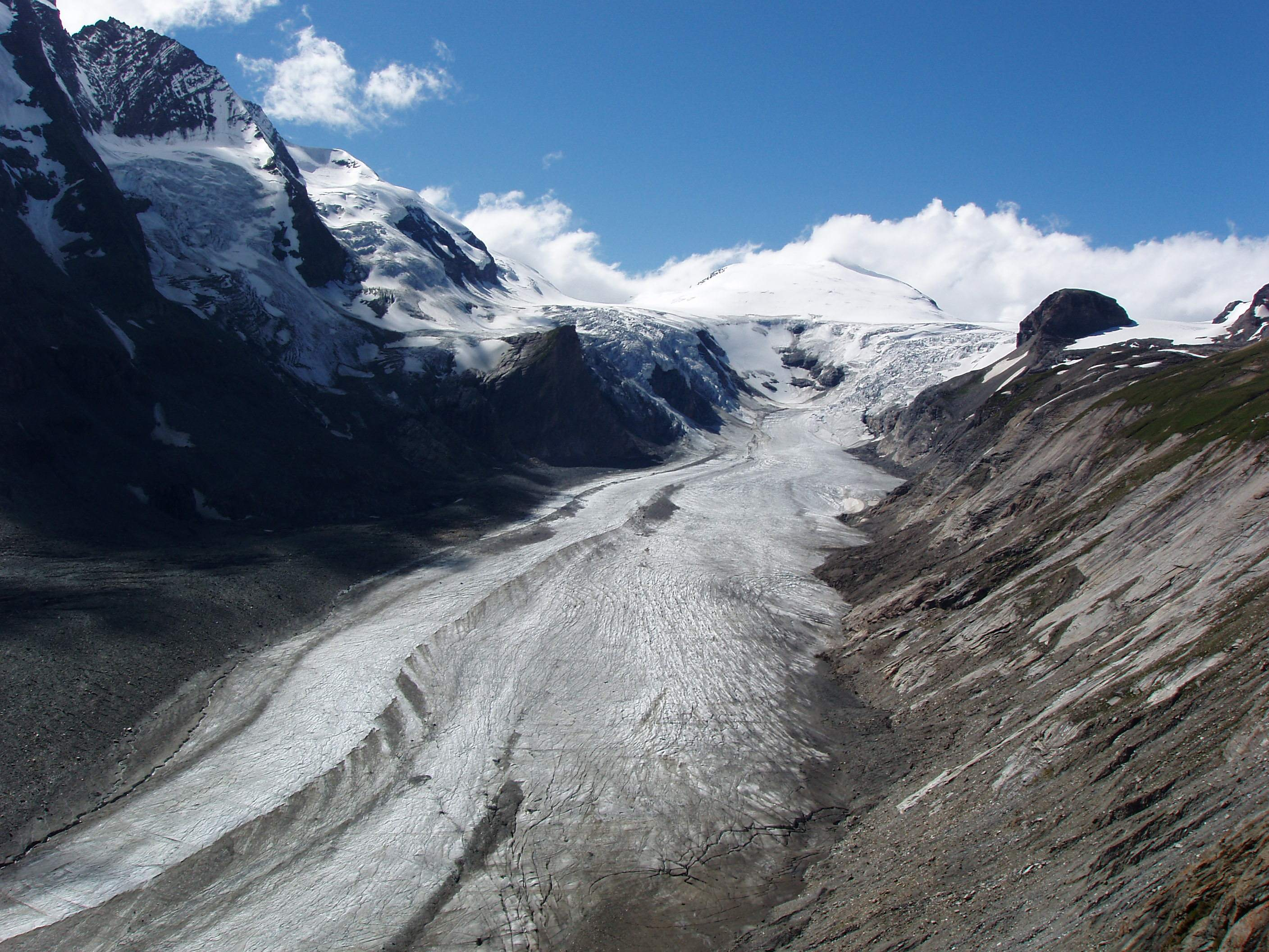 Pasterze im Sommer 2005